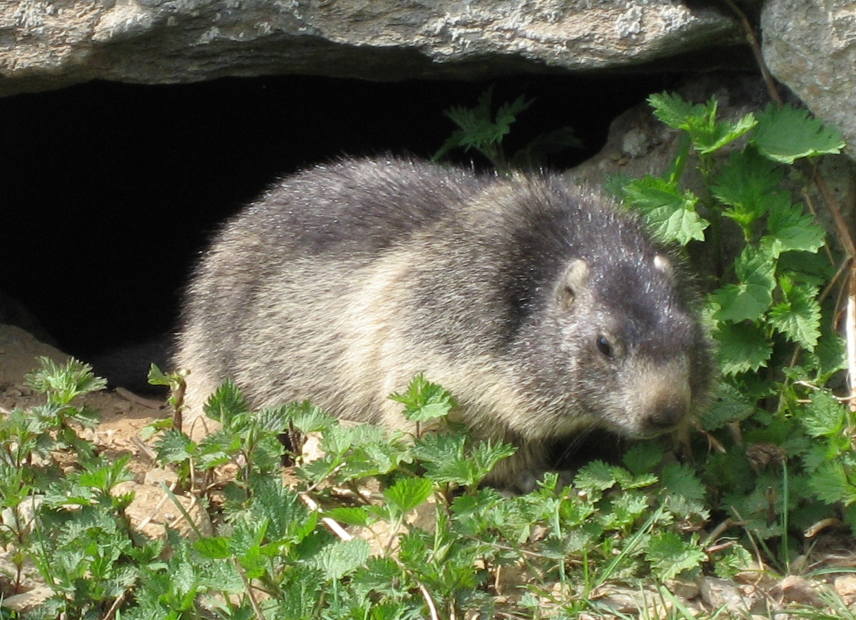 Marmota marmota in Parc de Merlet (Marmotte) Map: 45° 54' 26" N 6° 49' 2" E